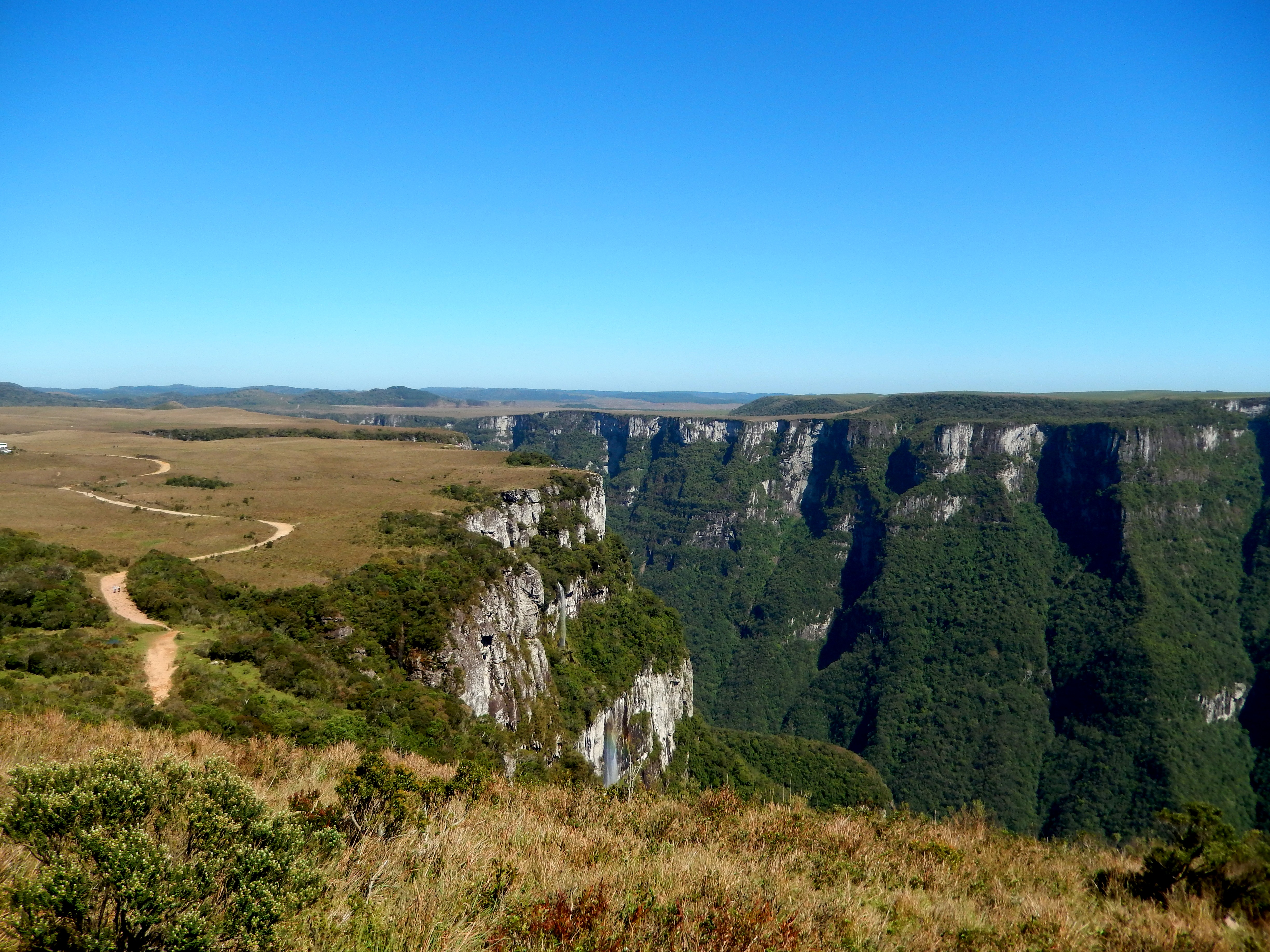 Estar tão próximo da natureza promove uma paz de espírito inigualável.